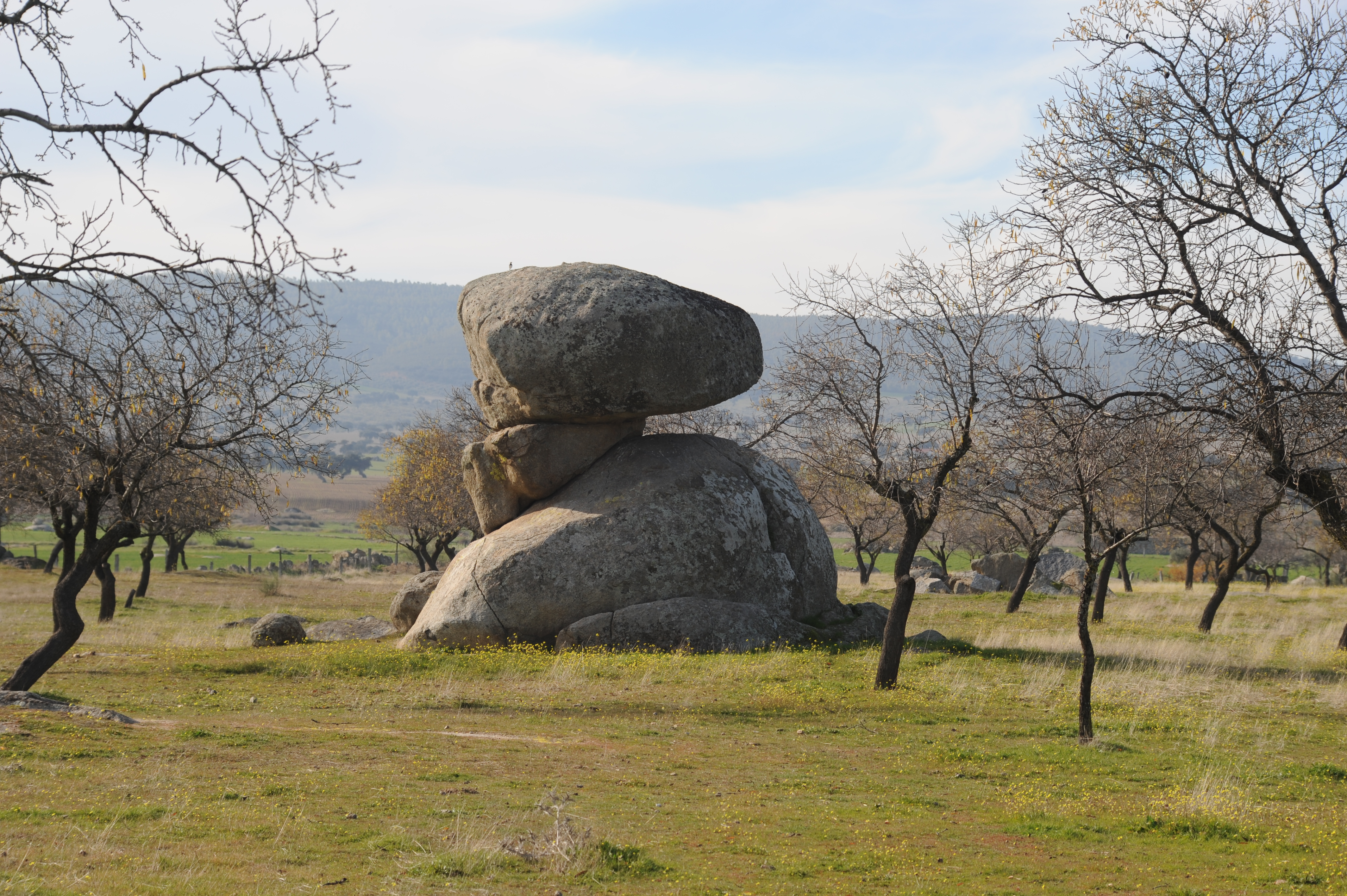 fotografia de un canchal en Quintana de la Sierra